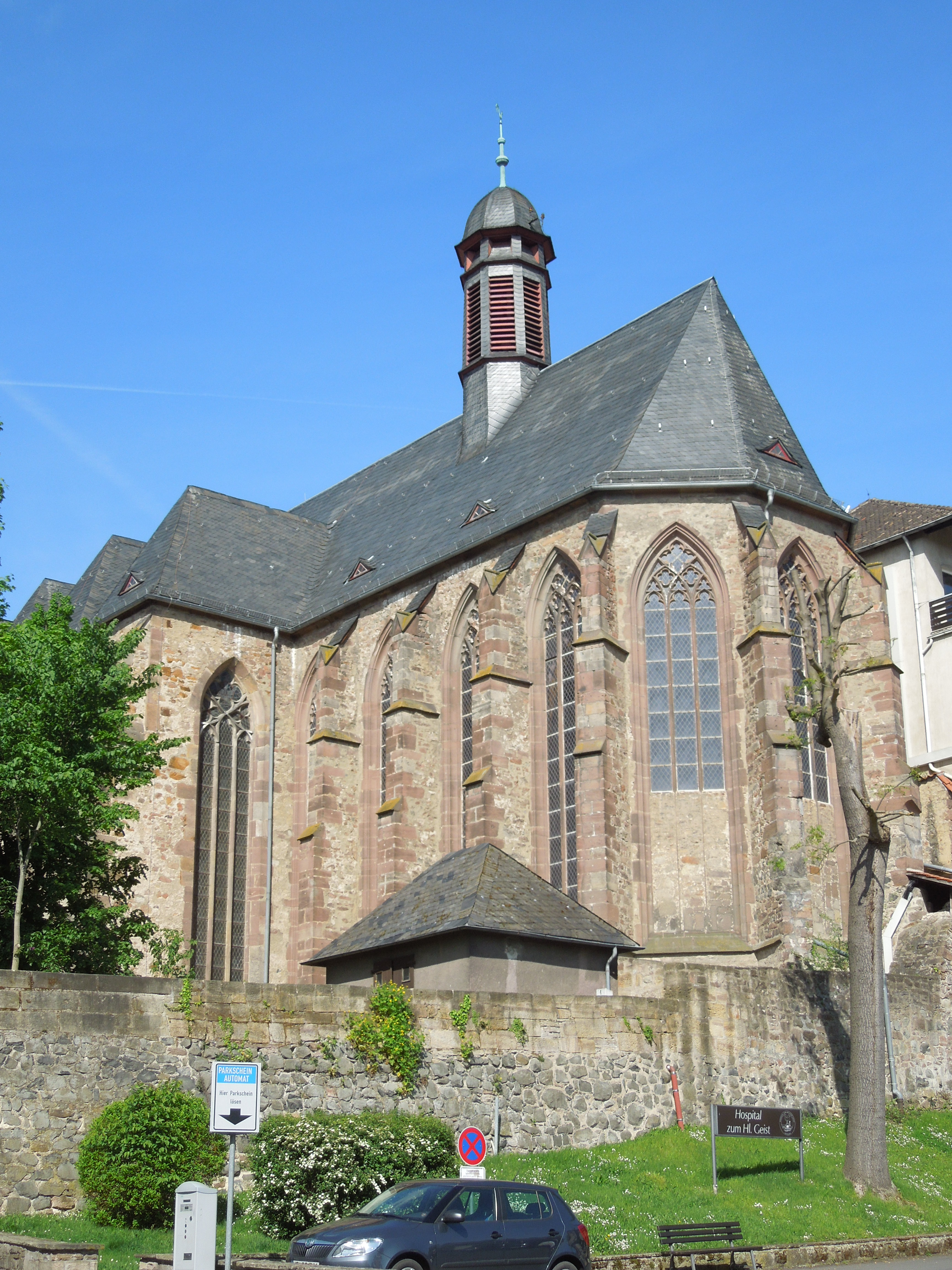 Die evangelische Stadtkirche in Fritzlar, ehemals Minoriten-Klosterkirche